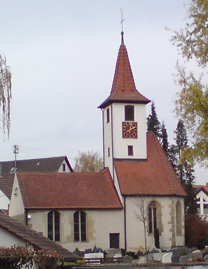 Die Christuskirche in der Schönbuchstraße in Neuweiler